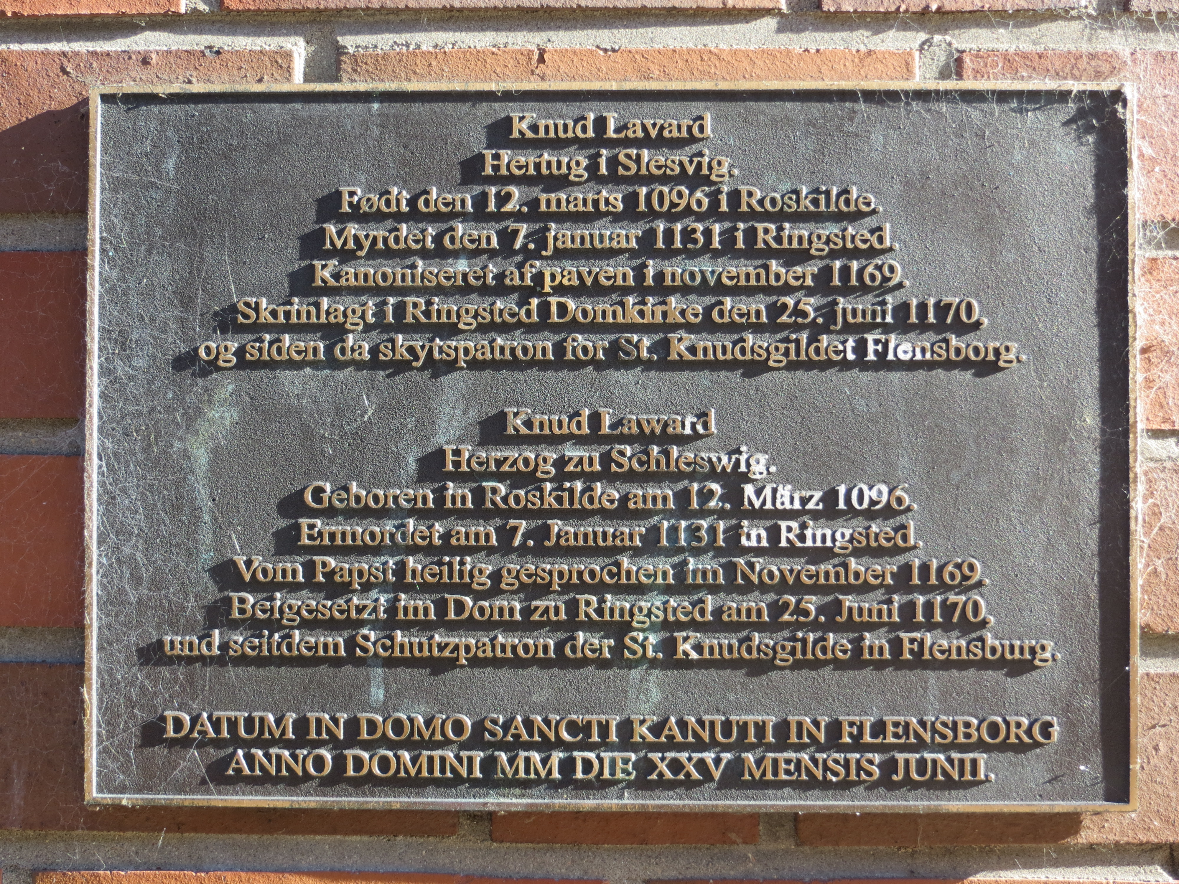 Gedenkschild Knud Laward, Schutzpatron der Knudsgilde in Flensburg bei der Knud-Laward-Straße